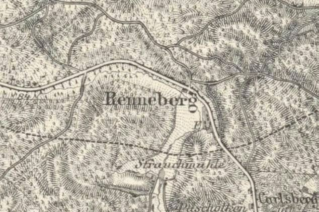 Gdańsk Rynarzewo (Renneberg) i ul. Spacerowa na mapie z 1901 r.